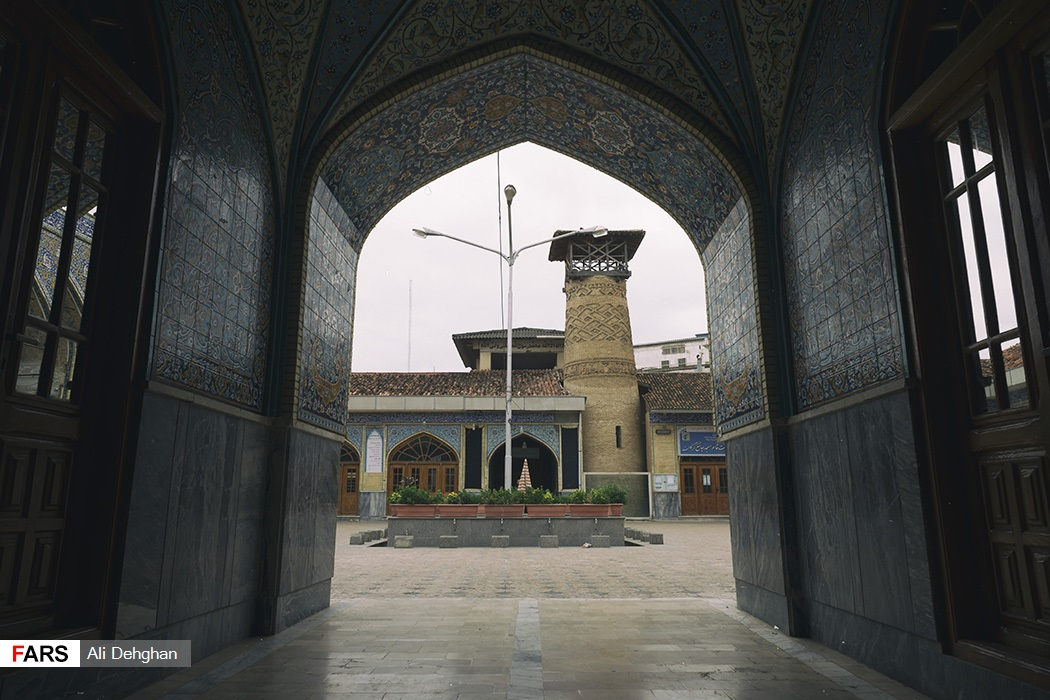 مسجد جامع گرگان مسجد جامع گرگان از بناهای تاریخی شهر گرگان در مرکز شهر و در بازار سنتی و قدیمی نعلبندان واقع شده که به ‌وسیله معماران ترکمن ساخته شده است، این مسجد بیش از ۱۱۰۰ سال قدمت دارد.این مسجد از یک حیاط مرکزی به شکل چهار ایوانی و چهار شبستان تشکیل شده است که از تزیینات معماری خاص آن دوره نیز استفاده شده است. بنای مسجد جامع گرگان حدود 1600 متر و دارای 4 شبستان حدود 1000 متر است. مسجد دارای دو ایوان شرقی و غربی است، این بنای مذهبی مربوط به عصر سلجوقیان در سنه 804 هجری قمری است. تنها بخش برجای مانده از معماری سلجوقیان، مناره مسجد جامع است که از آجر درست شده و به خط کوفی نوشته شده است.این مناره از سطح زمین تا قسمت اتاقک ماذنه، دارای ارتفاع ۱۰ متر و پهنای بخش بالایی مناره ۵۶۰ سانتی‌متر است. همچنین ۴۷ پله راه ارتباطی اتاقک ماذنه است که به ‌طور مارپیچ اطراف مناره قرار دارد. همچنین منبری قدیمی و تاریخی دارای هشت پلکان و از جنس چوب و از نوع قالب و گره در این مسجد موجود است که به‌صورت منبت‌کاری با نقش‌های گل و بوته آراسته شده است. خسارات و صدمه‌های زیادی به بدنه سمت راست چوب به‌خاطر مجاورت بدنه با دیوار و در اثر رطوبت و گذشت زمان وارد شده است. به‌طور کلی منبر پوسیدگی‌ها و شکستگی زیادی را دیده است و اکنون در یک محفظه شیشه‌ای محافظت می‌شود. این منبر به تعمیر و نگهداری اصولی و علمی بیشتر نیاز دارد. این مسجد در سنه های مختلف چندین بار مرمت شده است از جمله در زمان شاه عباس اول و شاه عباس دوم صفوی.بر دیوار ایوان غربی مسجد کتیبه و سنگ نوشته‌هایی از فرامین شاهان به سال 857 قمری نصب است.